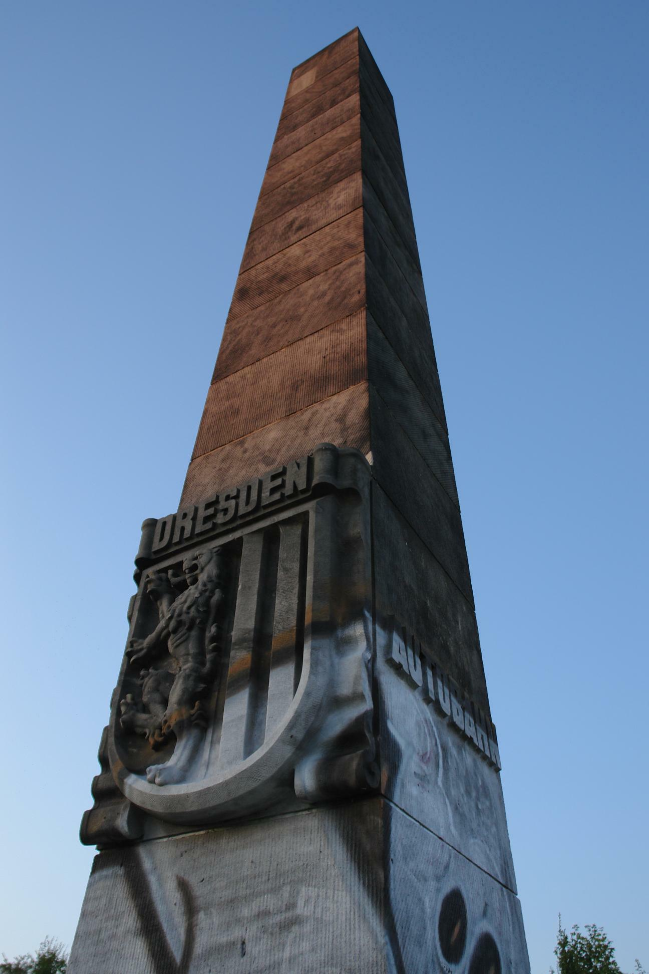 Autobahn-Obelisk Dresden Kaditz